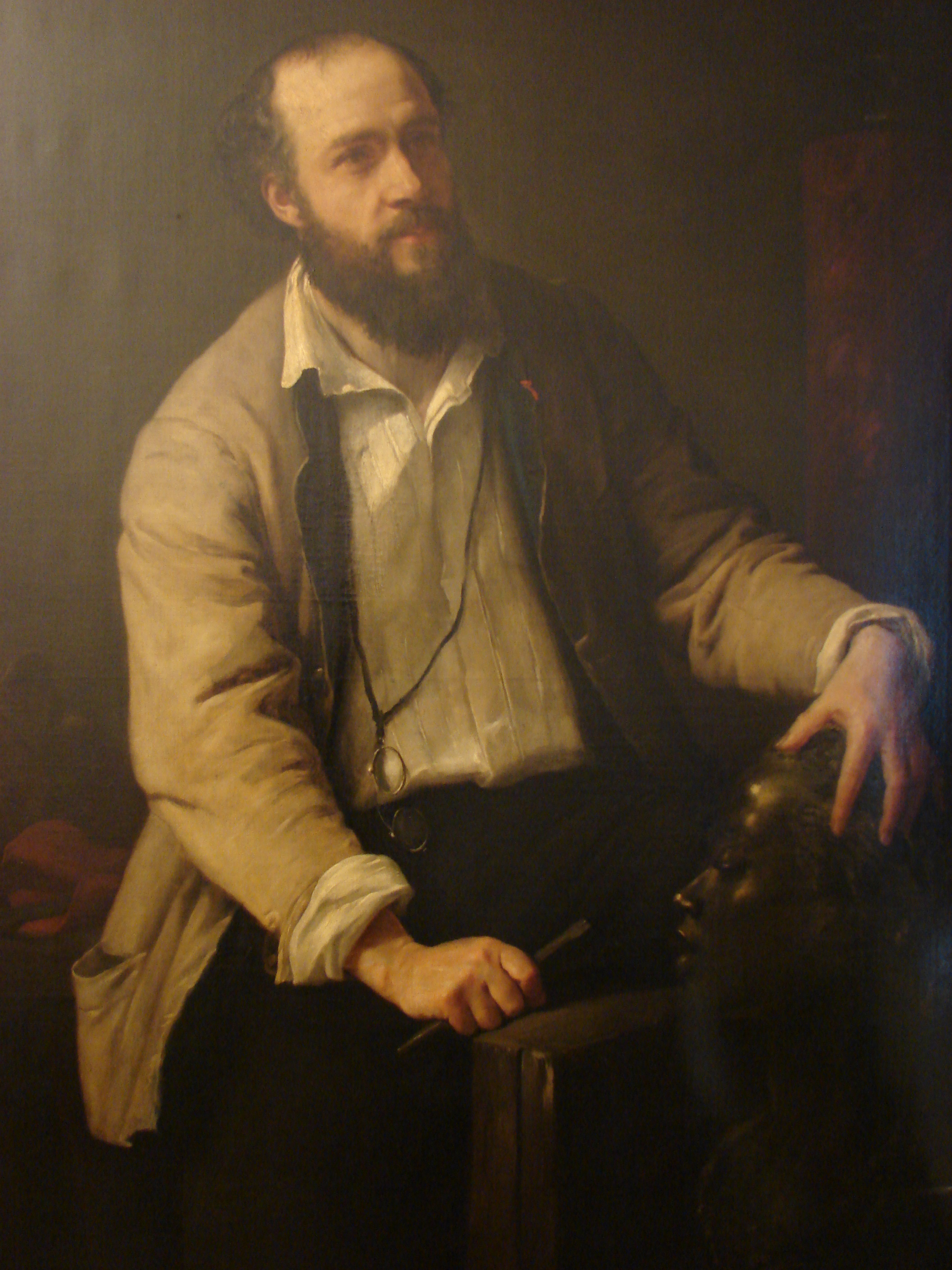 Attribué à Jacques Leman, Charles Cordier sculptant la Vénus Africaine, 1863, huile sur toile, collection particulière non sourcée.